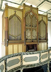 Die Ladegastorgel in der Stadtkirche zu Naunhof vor der Restaurierung im Jahr 2004